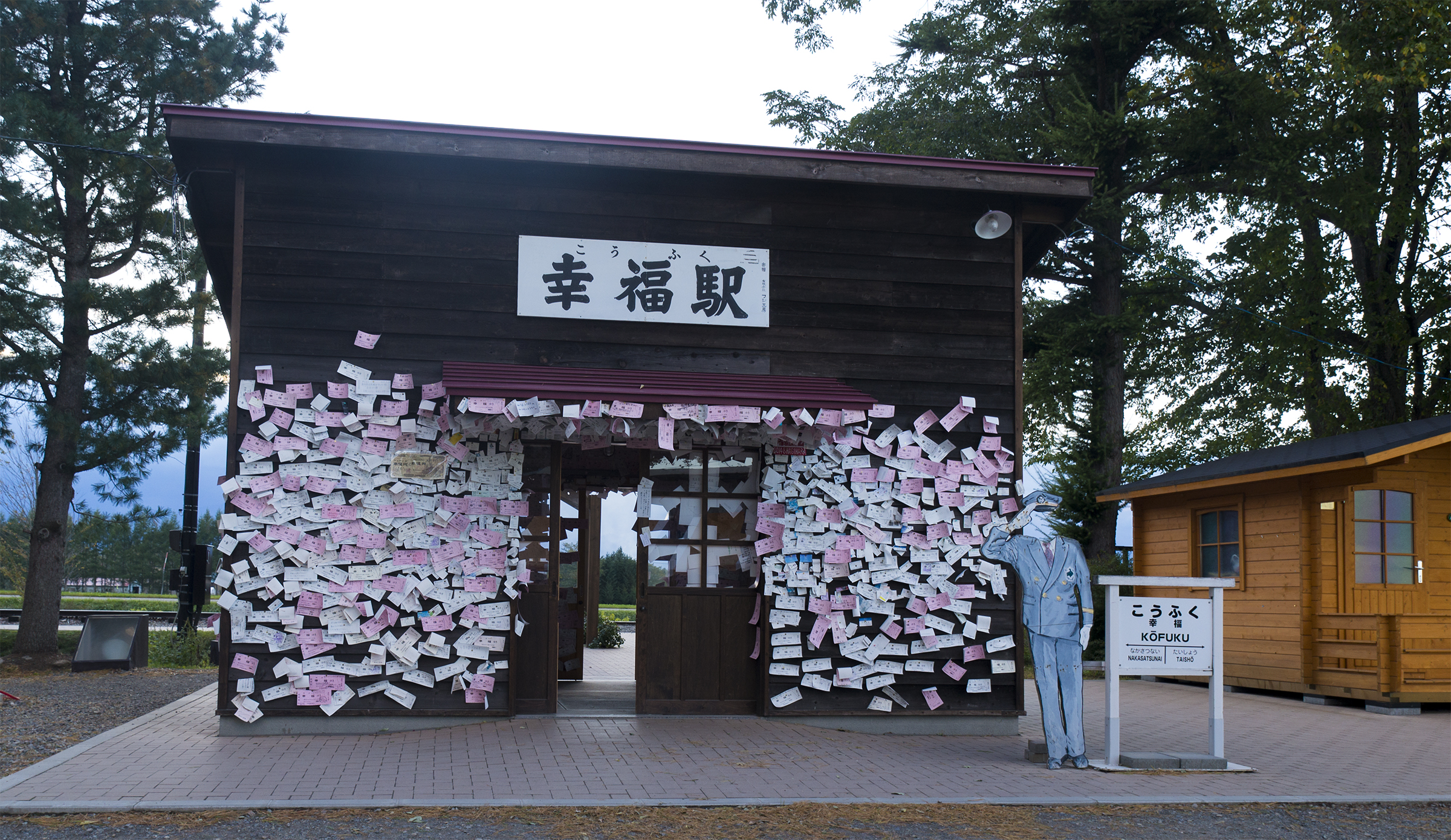 （旧）日本国有鉄道広尾線幸福駅跡（駅舎は建替後）